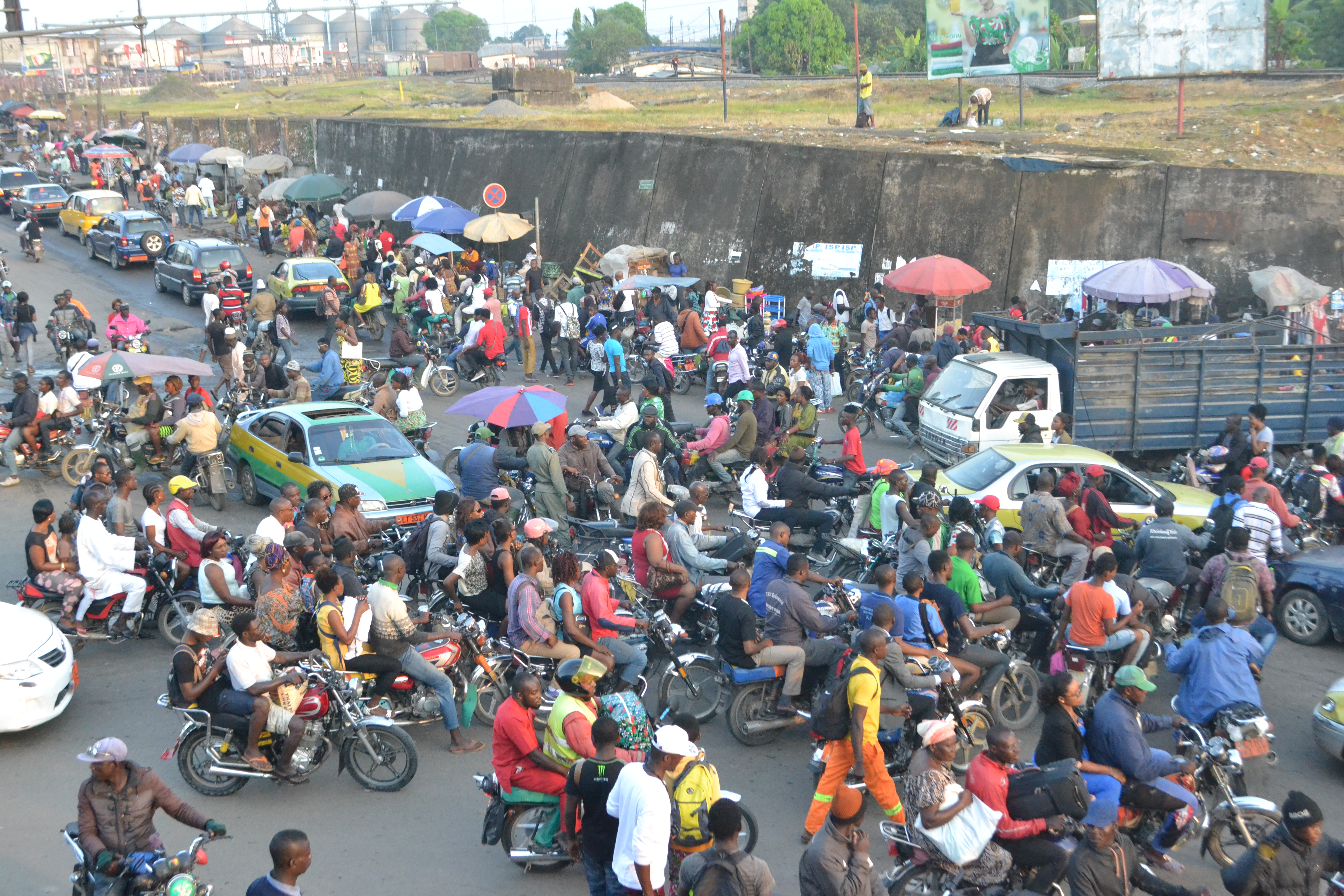 Des centaines de motos au carrefour Ndokoti de Douala